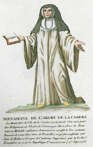 Collection de costumes de tous les ordres monastiques, supprimés à differentes époques, dans la ci-devant Belgique, Bruxelles, Philippe Joseph Maillart et sœur, 1811